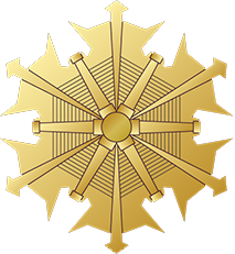 logo of Tokyo Fire Department